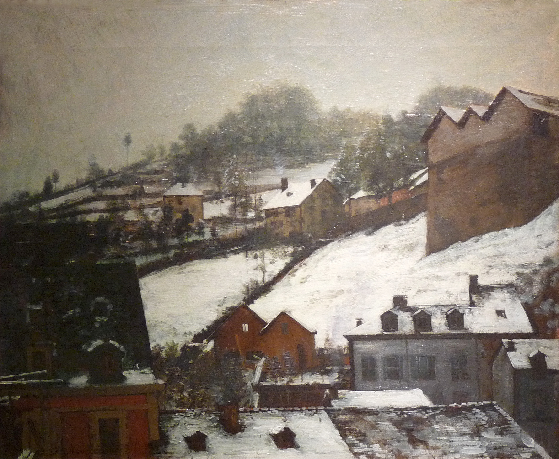 Louis